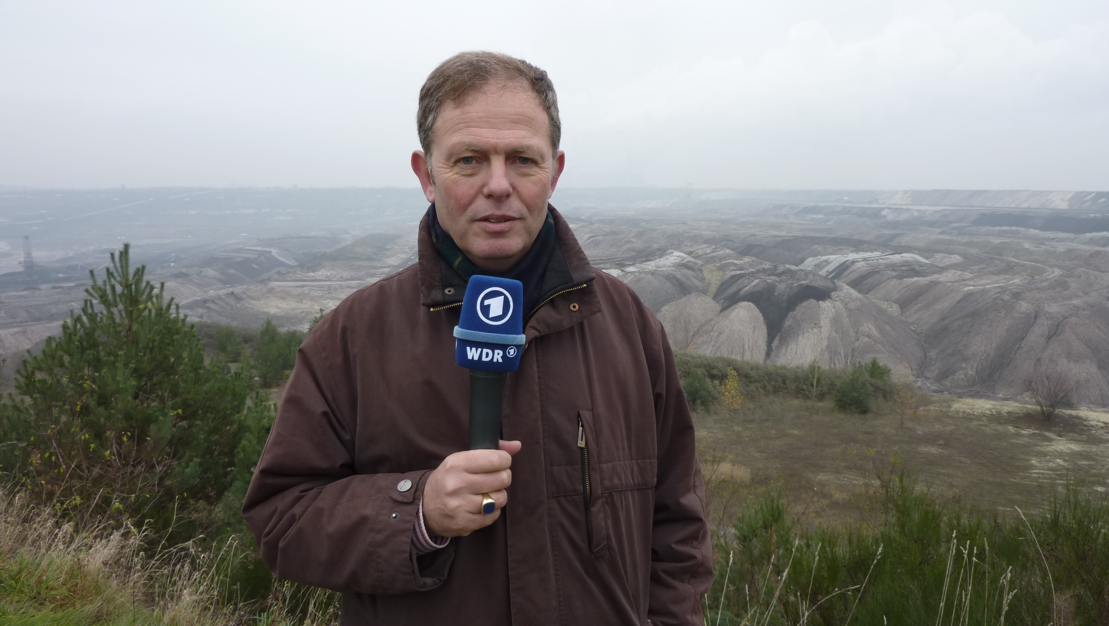 Beckhardt während der Berichterstattung vom Weltklimagipfel 2013 in Warschau